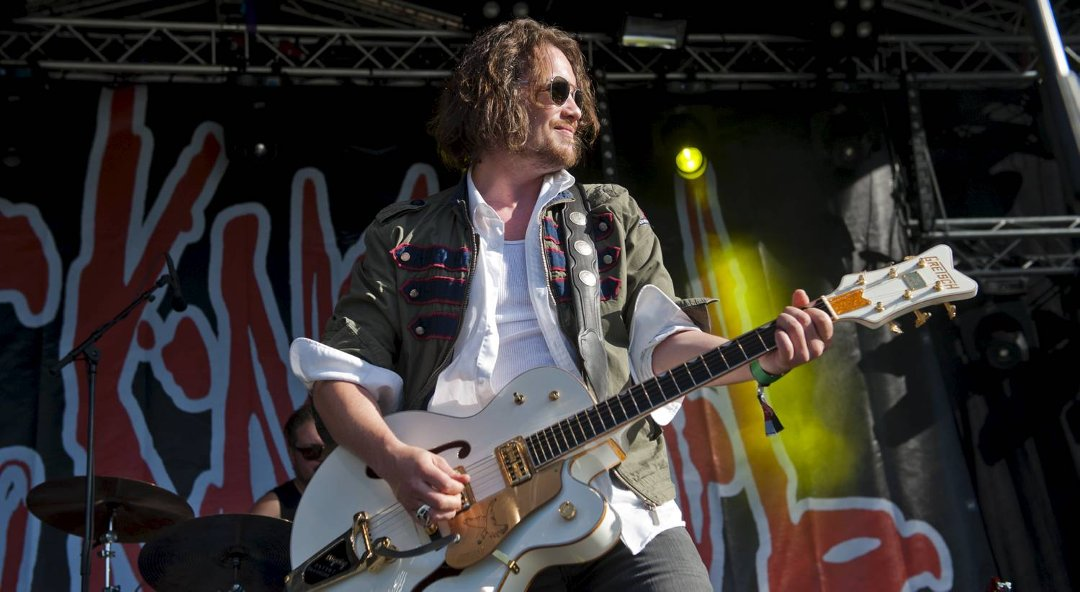 Orbo live på festival i 2010